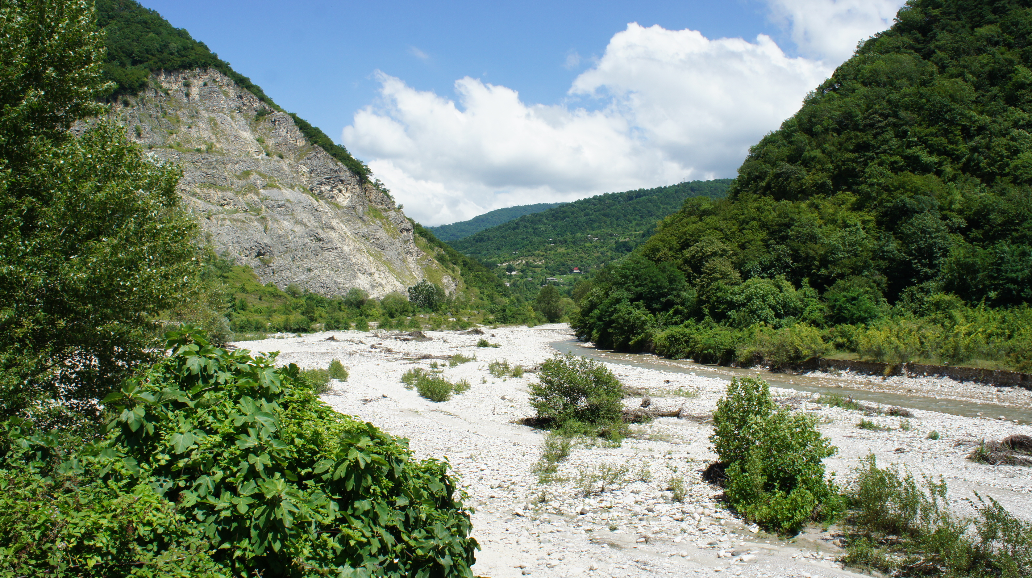 Ачмарда, вид из долины Хашупсе